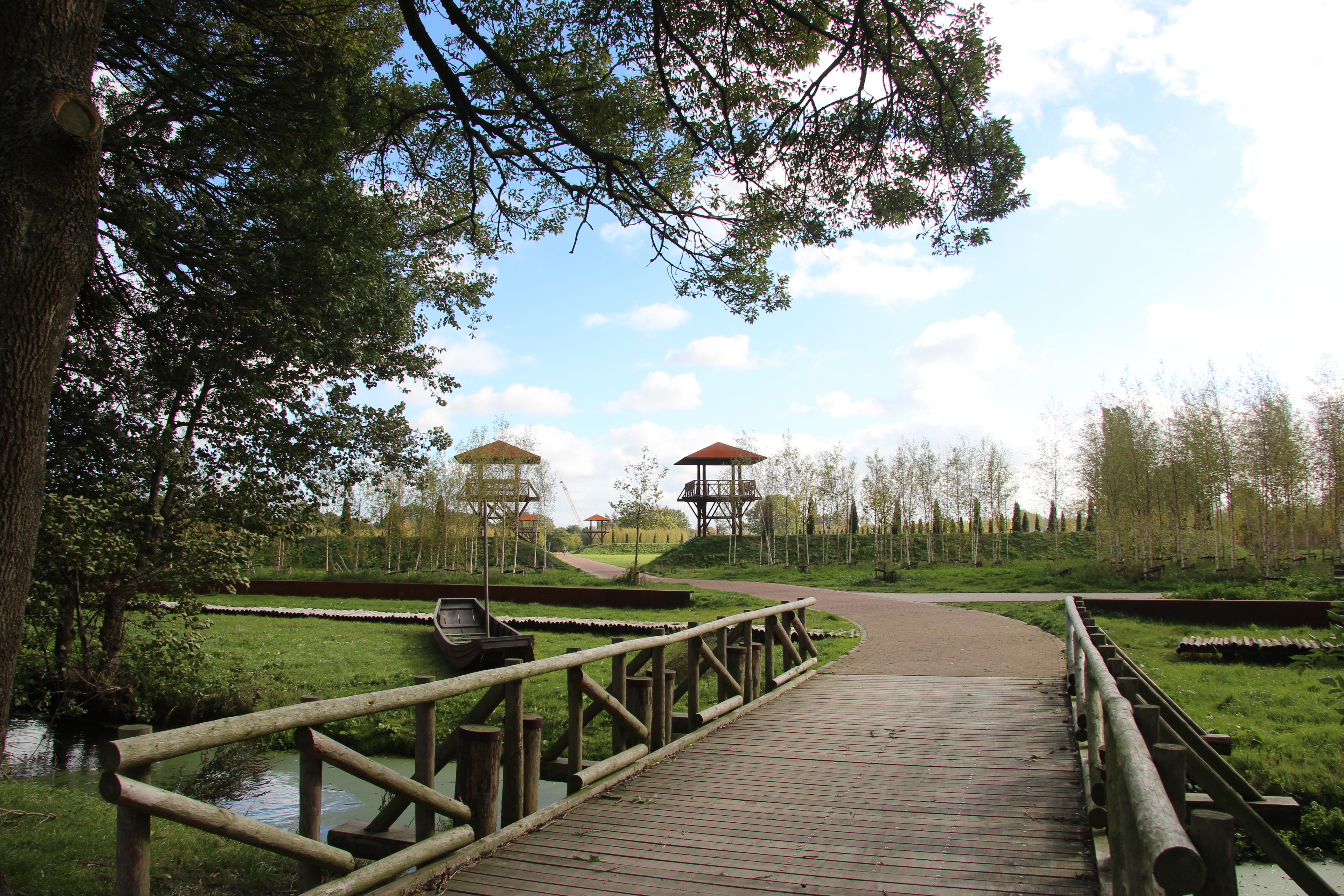 Brug ten westzijde van de reconstructie van castellum Matilo in het Archeologisch Park Matilo te Leiden.